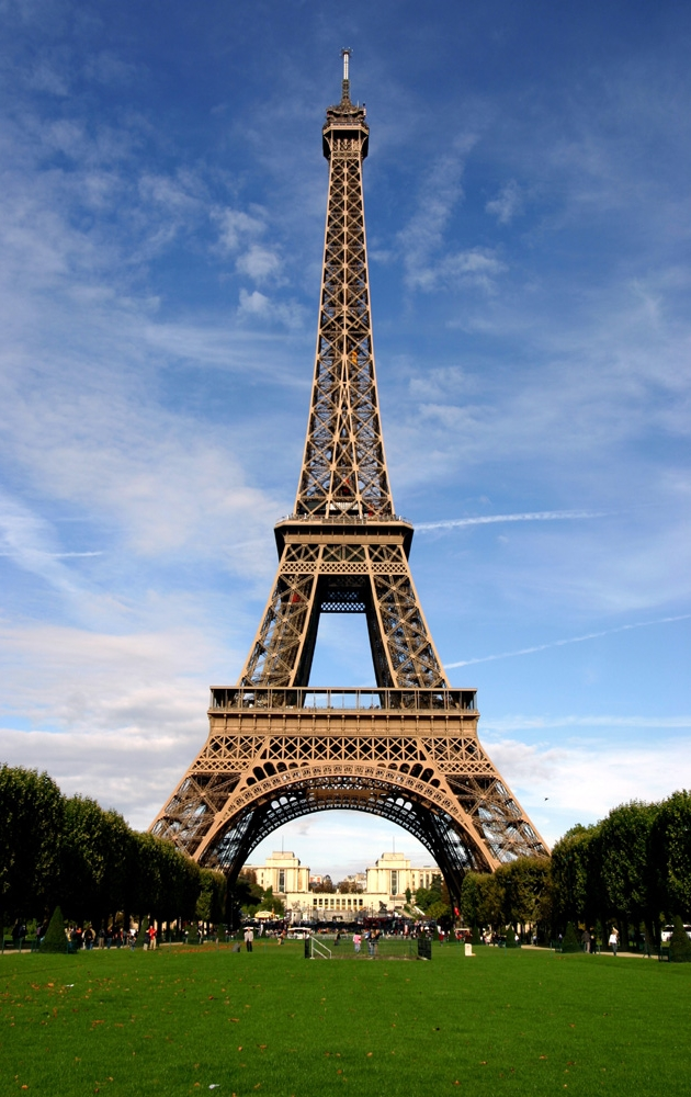 Eiffelturm